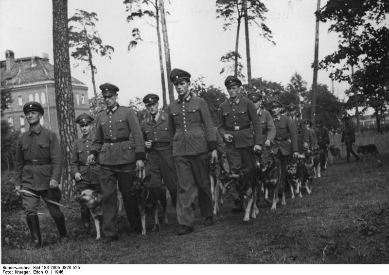 Berlin, Polizei-Hundeschule in Tegel Illus- Erich O.Krueger Polizei-Hundeschule Tegel in Berlin, 1946. Die Hundeführer mit ihren Hunden auf dem Marsch.